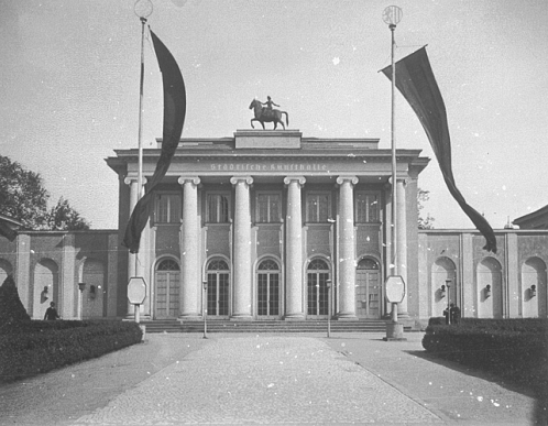 Neues Städtisches Ausstellungsgebäude, Dresden. Eingangsbereich. Architekten Hans Erlwein und Karl Hirschmann. Erbaut 1914-1916